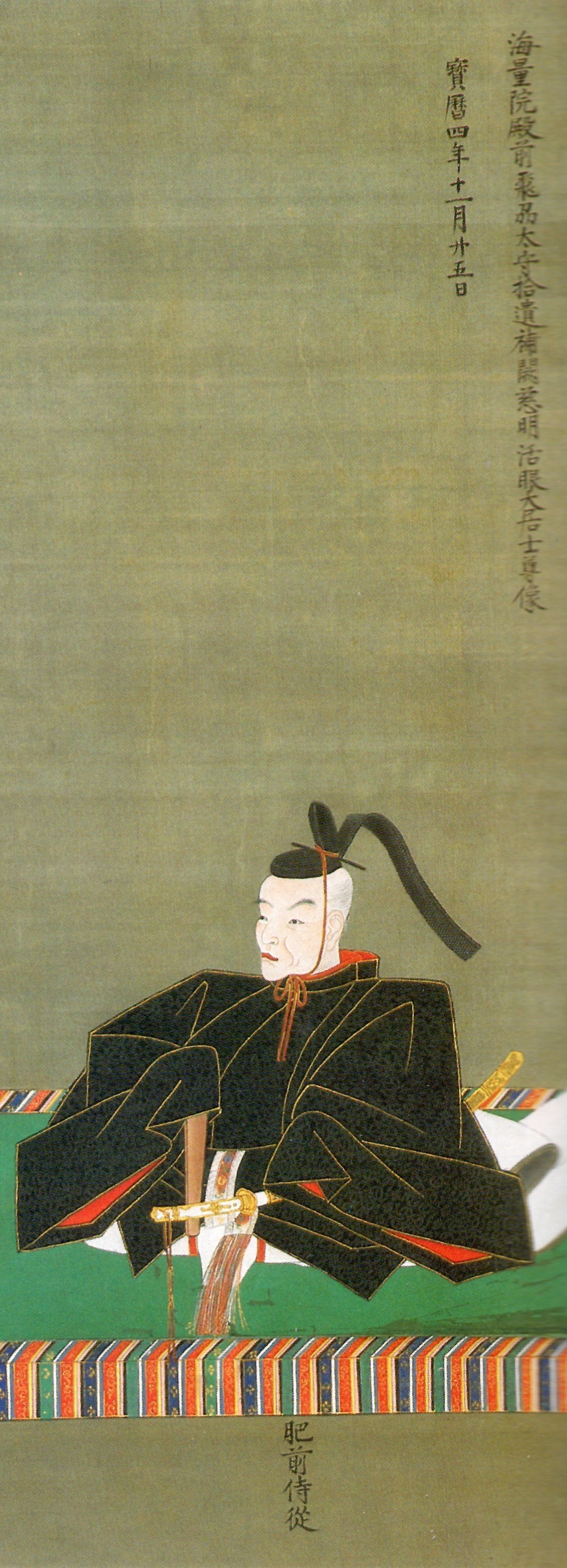 鍋島宗茂の肖像。